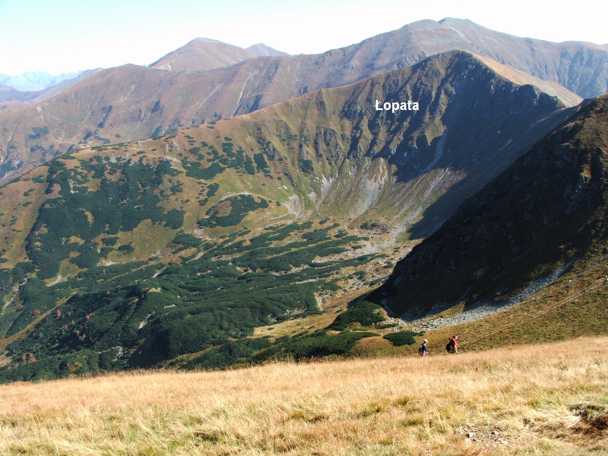 Łopata. U góry Kończysty Wierch, Jarząbczy Wierch, Starorobociański Wierch (West Tatra Mountains)